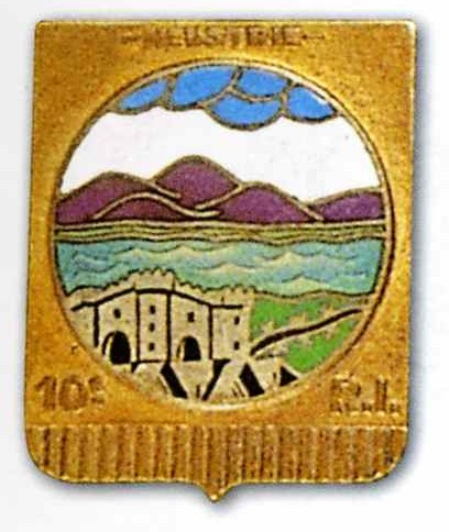 insigne régimentaire du 10e RIF